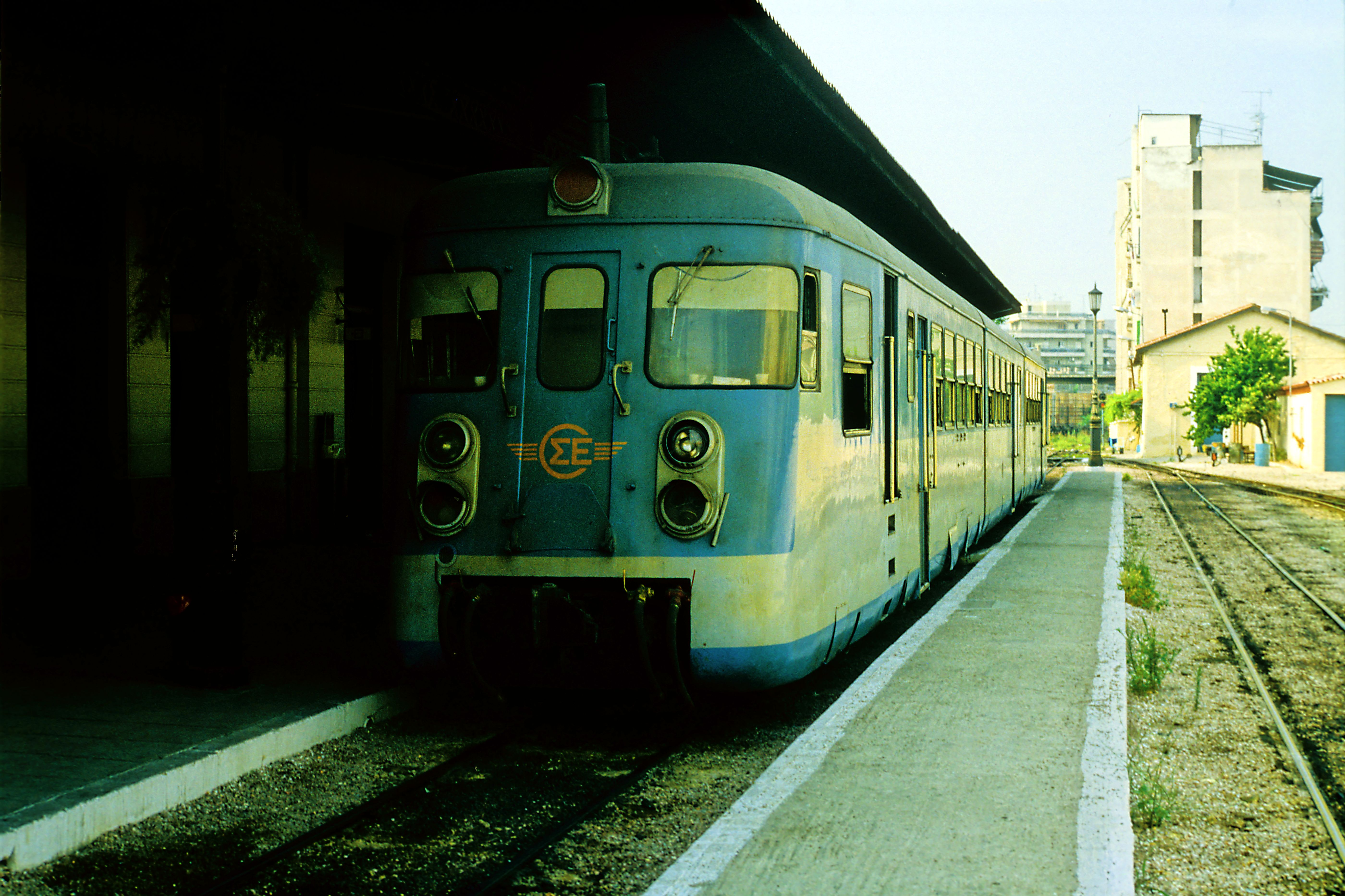 Dreiteiliger Gelenktriebwagen als Leerpersonenzug von Pireás, möglicherweise streikbedingt. Der Kontrast war für Umkehrfilm und Scanner leider etwas groß.